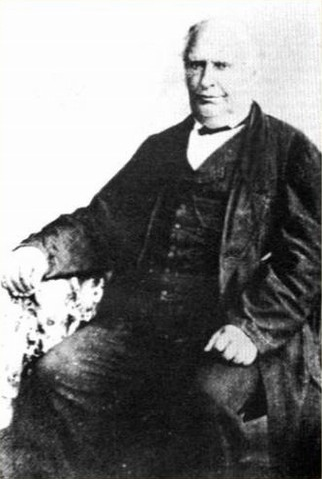 Fotografia do alferes João da Costa Gomes Leitão